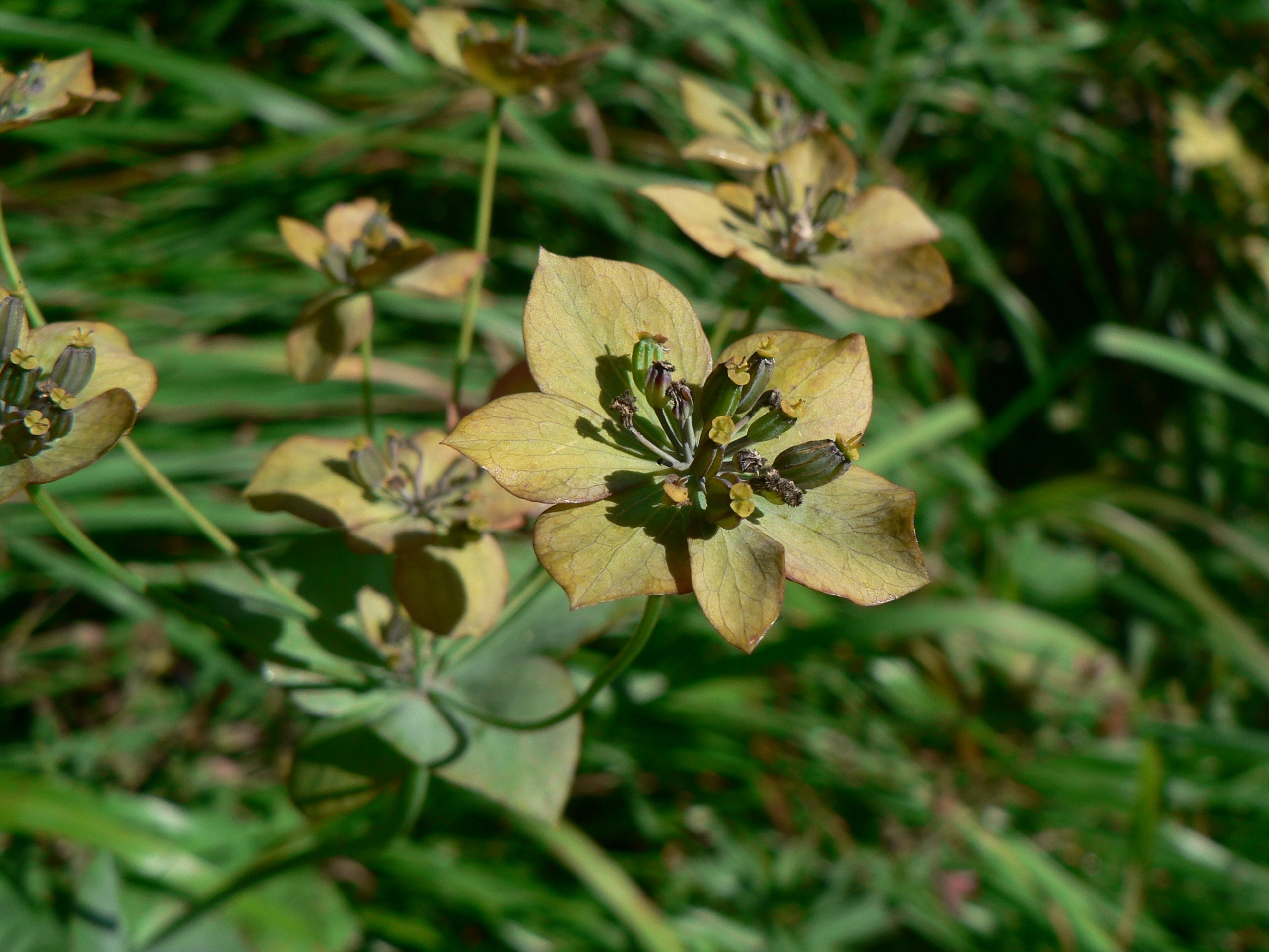 Bupleurum longifolium